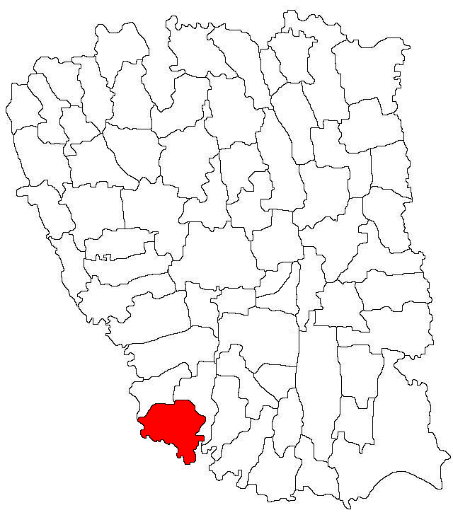 Categorie:Hărţi ale judeţului Galaţi